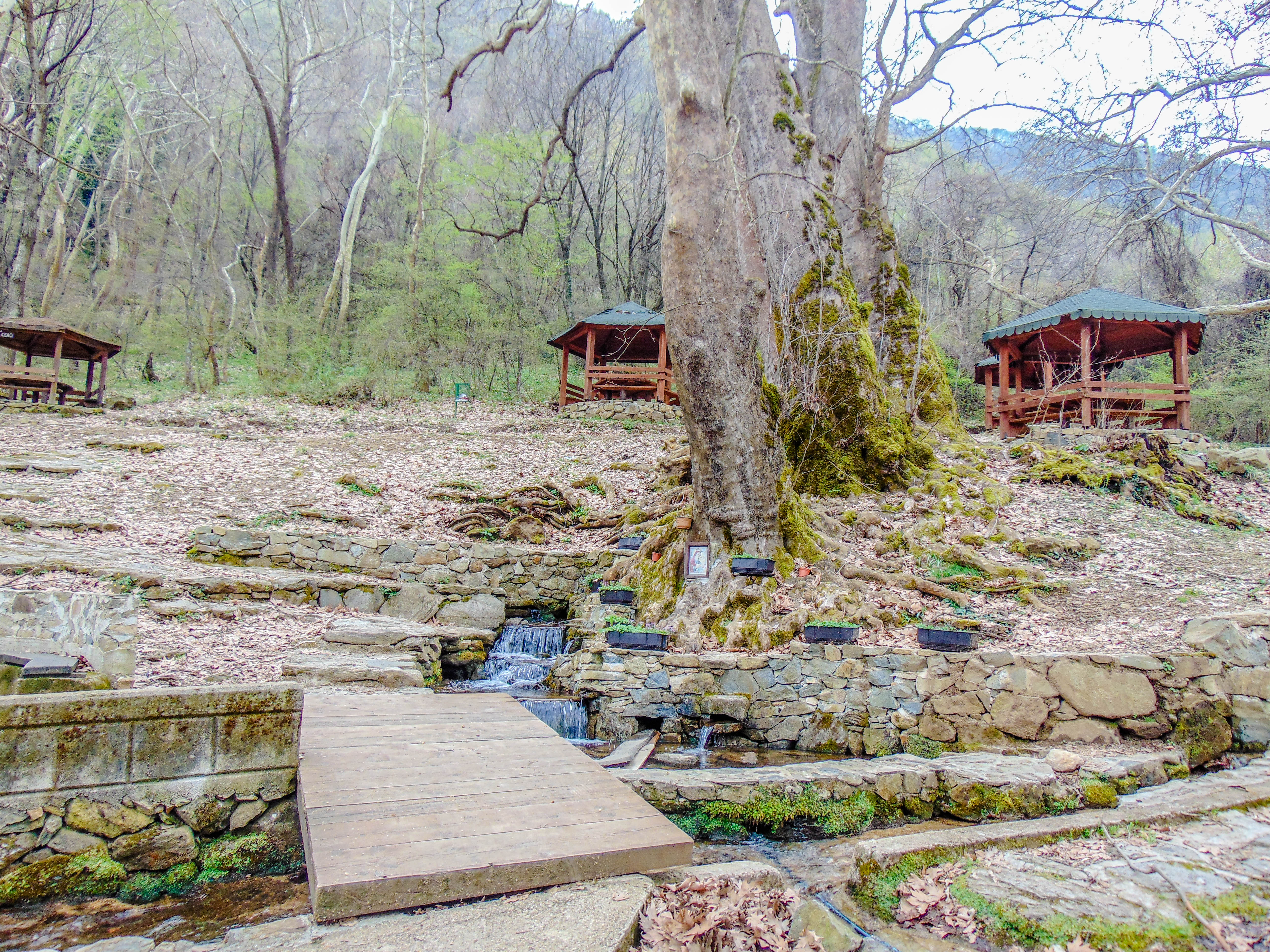 Мокрински извори